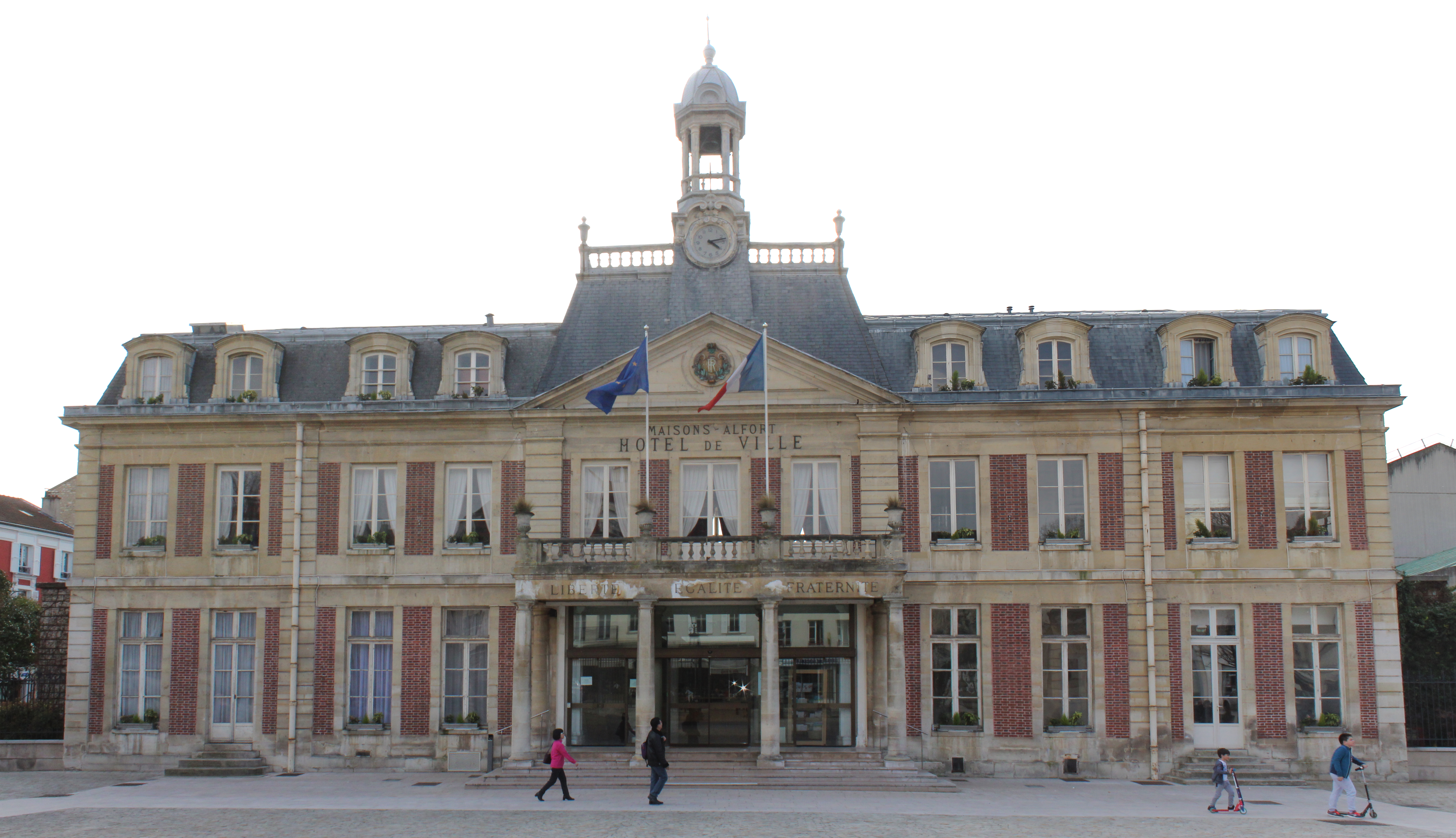 Hôtel de ville de Maisons-Alfort.